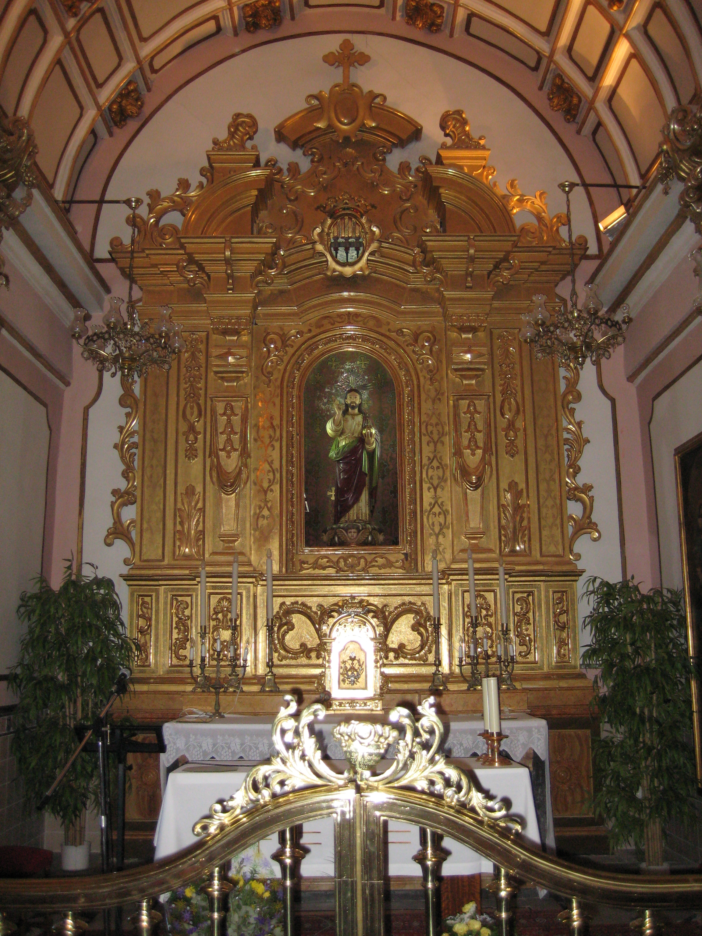 Altar de l'ermita del Salvador d'Onda (Plana Baixa)